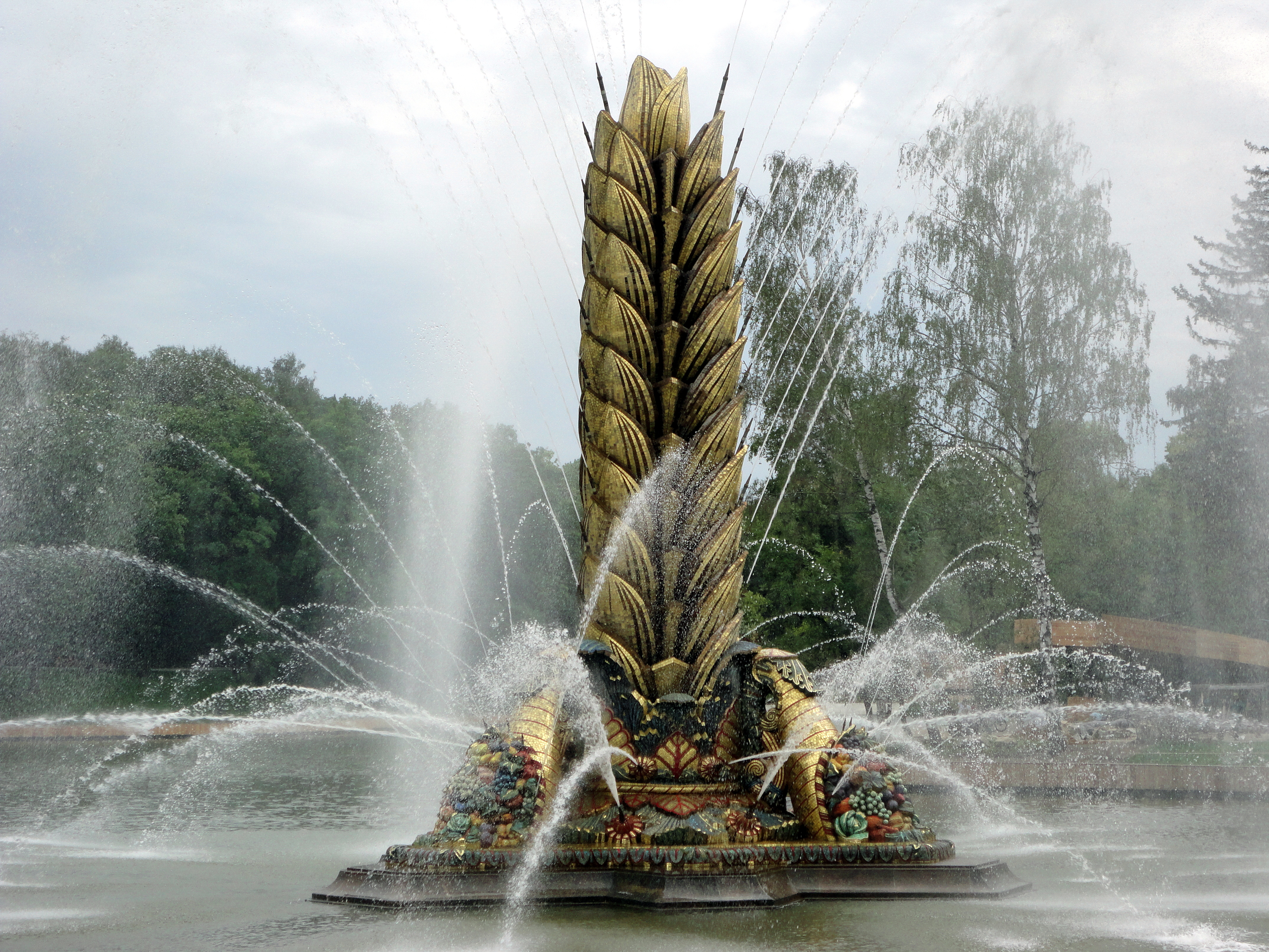 Фонтан Золотой колос: просп. Мира, на территории ВВЦ, Останкинский, Северо-Восточный округ, Москва